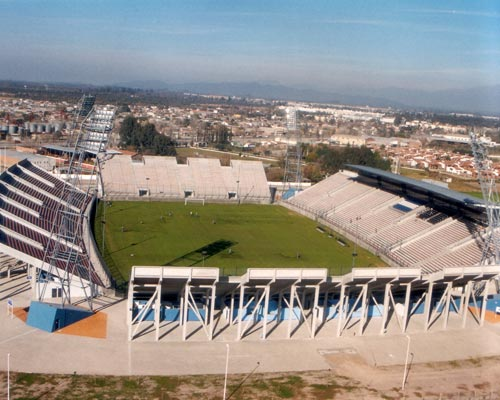 Foto ilustrativa del lugar en cuestión